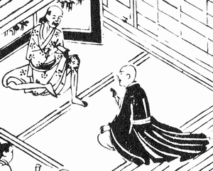 Jinmenso (人面疽) from Otogi Boko (伽婢子)